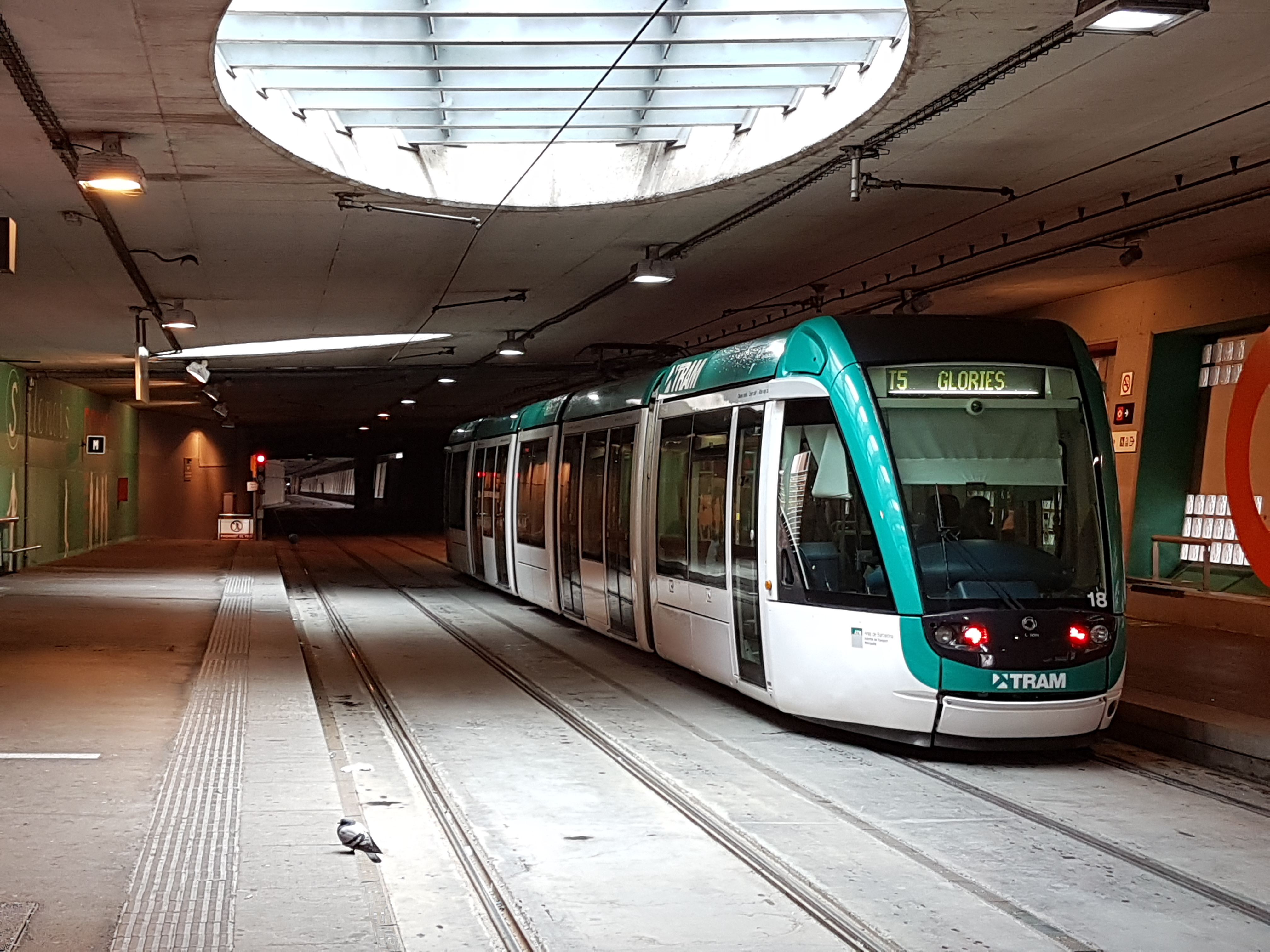 Tramvia Citadis 302 de la línia T5 destinació Glòries a l'estació de Besòs